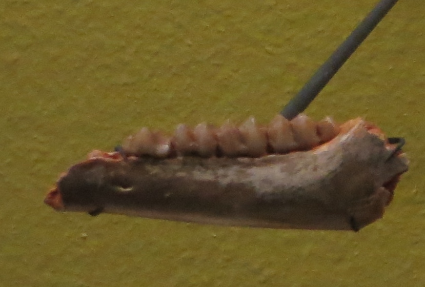 Fossil of Xiphodon - Took the picture at Natural History Museum, Basel